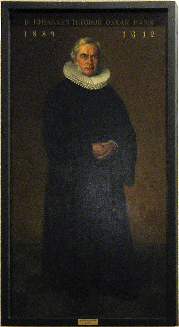 Oskar Pank (1838-1928)label QS:Lde,"Oskar Pank (1838-1928)"label QS:Len,"Oskar Pank (1838-1928)"